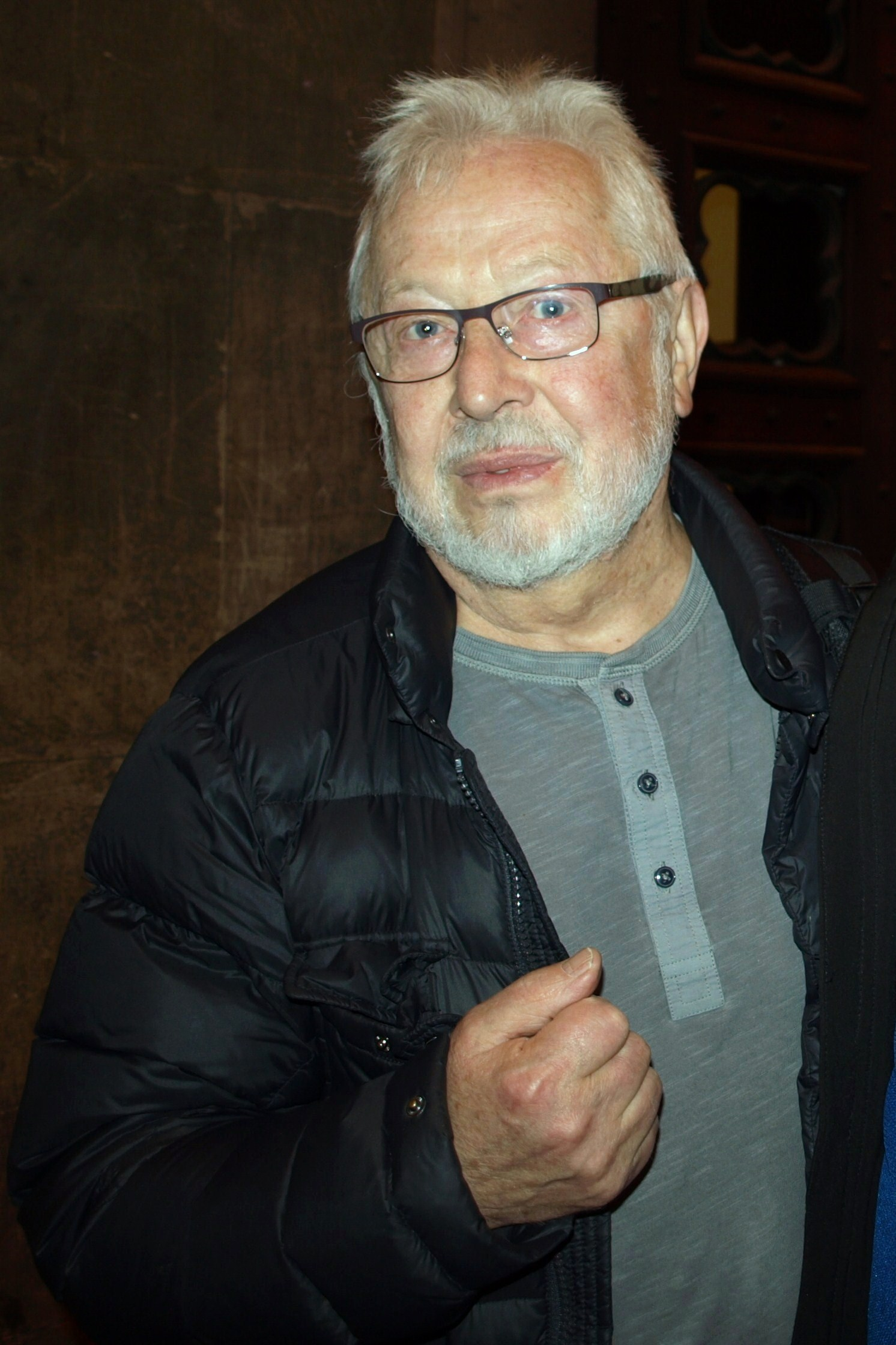 Aktor Władysław Kowalski.